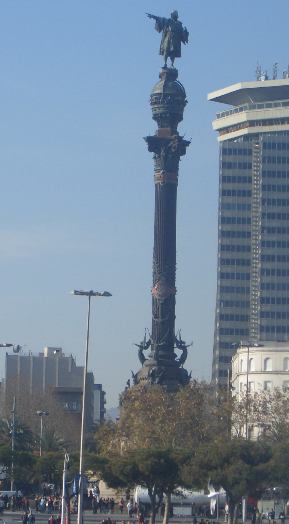 Monument a Colom, a l'antiga Porta de la Pau. De l'arquitecte Gaietà Buïgas, de l'escultor Rafael Atché i altres. Els lleons de la base són d'Agapit Vallmitjana. Els grups escultòrics que representen personatges de la història de Catalunya, relacionats amb el descobriment, són obra d'Eduard Batista Alentorn, Pagès i Serratosa, Fuxà i Josep Gamot i Llúria. Els vuit relleus de bronze amb escenes de vida de Colom, de Josep Llimona i Antoni Vilanova, van ser robats poc després de la seva inauguració. Els actuals dels escultors Fuxà i Carbonell i Torres, van ser col·locats el 1929.